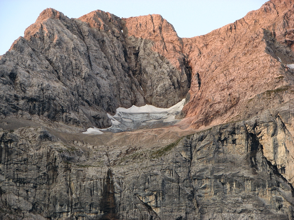 Es gibt in den Nördlichen Kalkalpen einige kleine und kleinste Gletscher, einer davon befindet sich im Karwendel in den Eiskarln in der Hinterautal-Vomper-Kette.